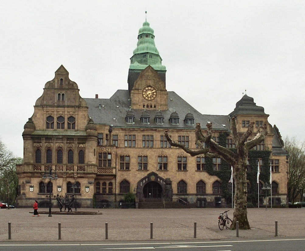 Das Rathaus von Recklinghausen, Deutschland